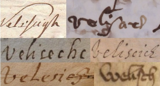 Varianti cognome Velliscig dal 1300 al 1850